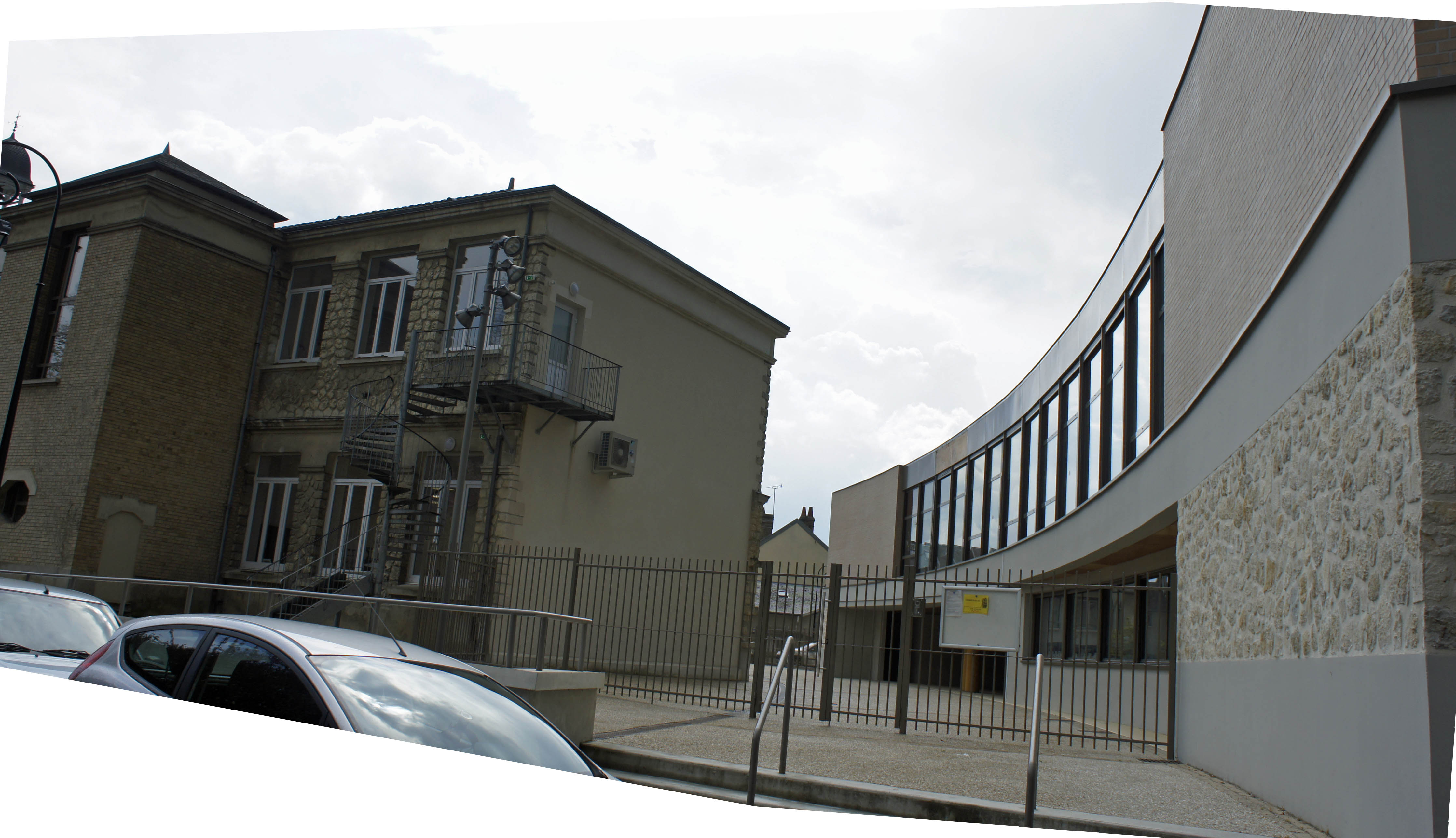 Mairie, médiathèque et école de musique à Jonchery.